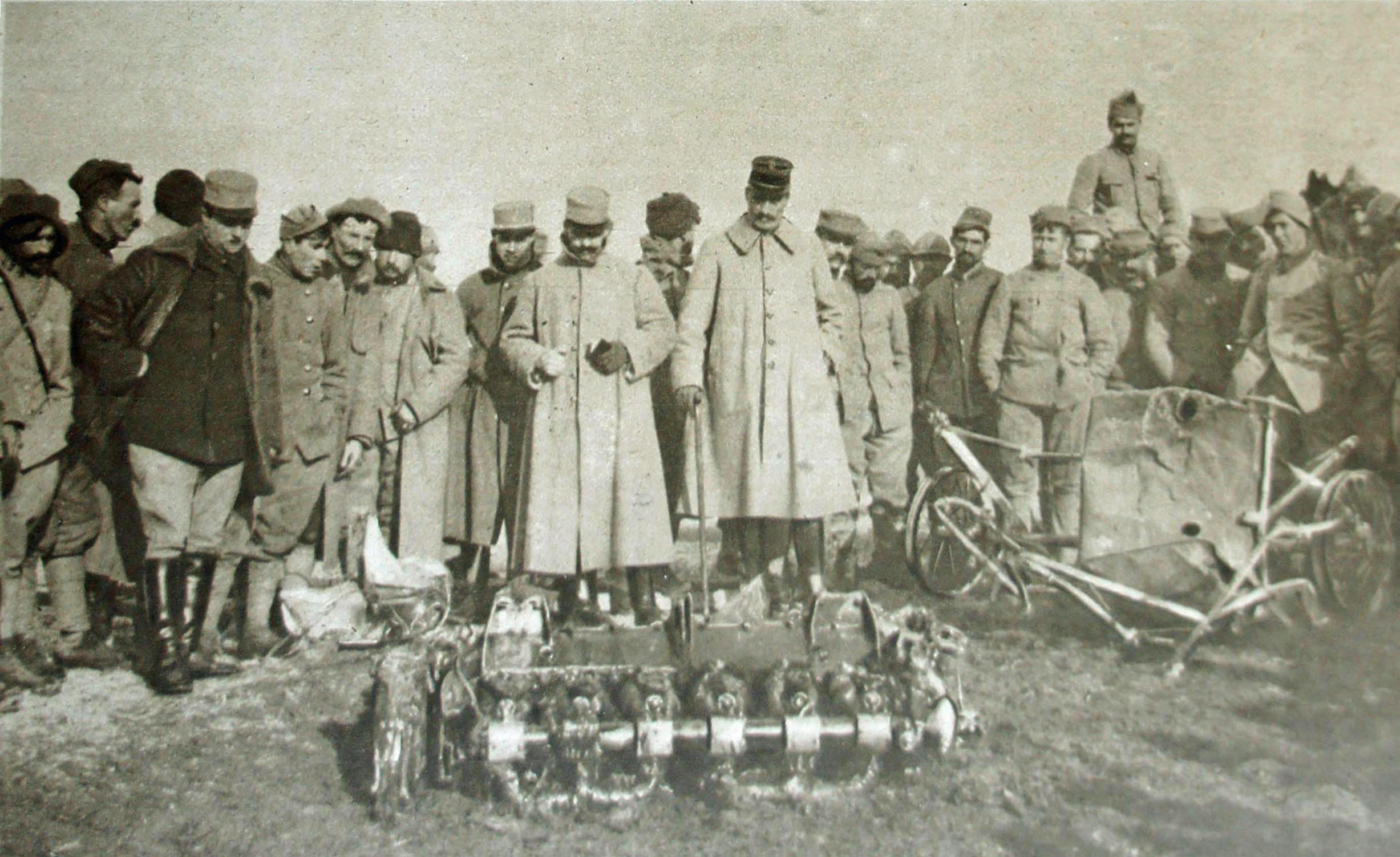 Le Miroir N°168 page 6 le commandant Antonin Brocard, avec une canne et un moteur d'avion abattu.